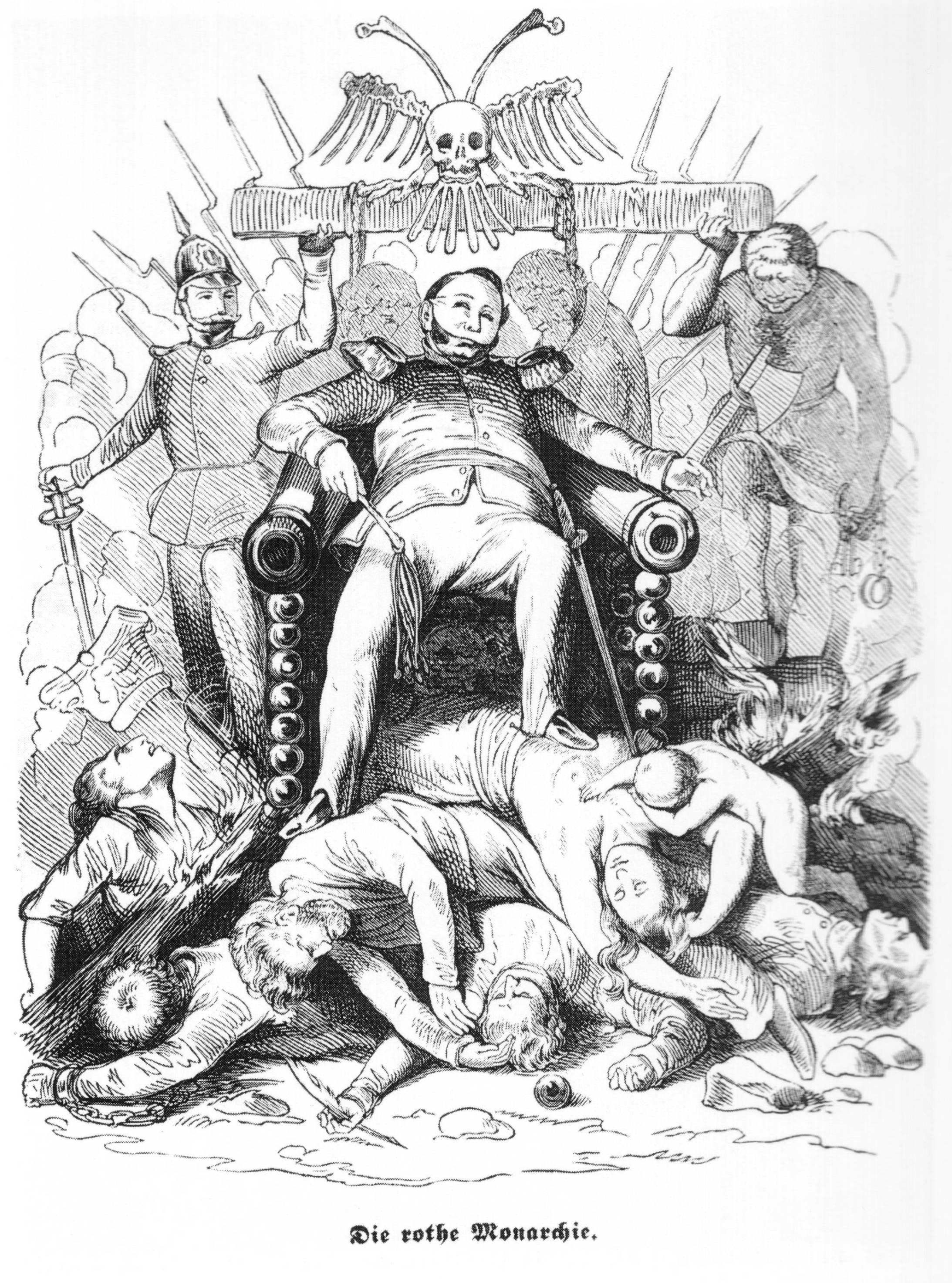 “Die rothe Monarchie”. Friedrich Wilhelm IV